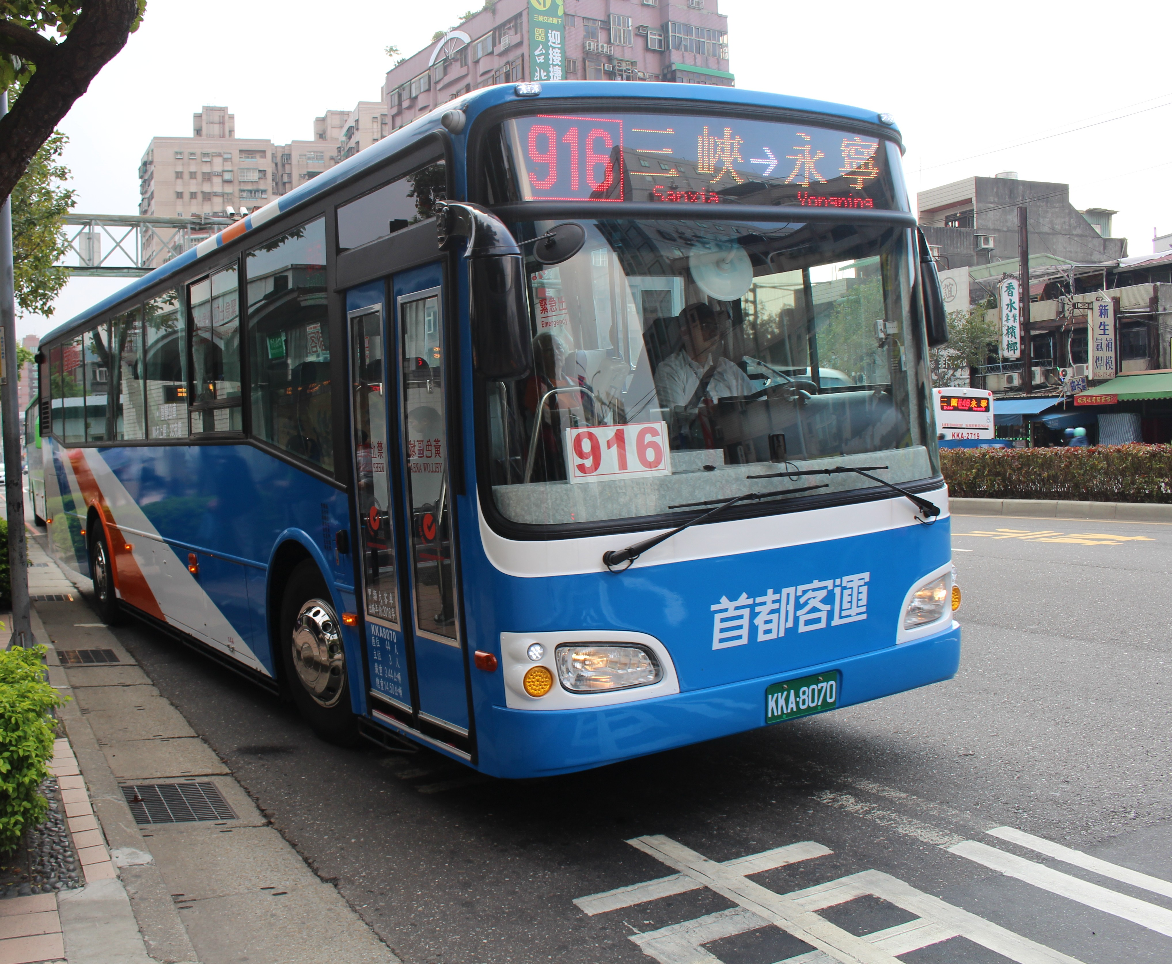 首都客運2018 HINO RK8JRVA-KJF KKA-8070 916（本圖自捷運永寧站在南下搭乘方向的公車站拍攝）